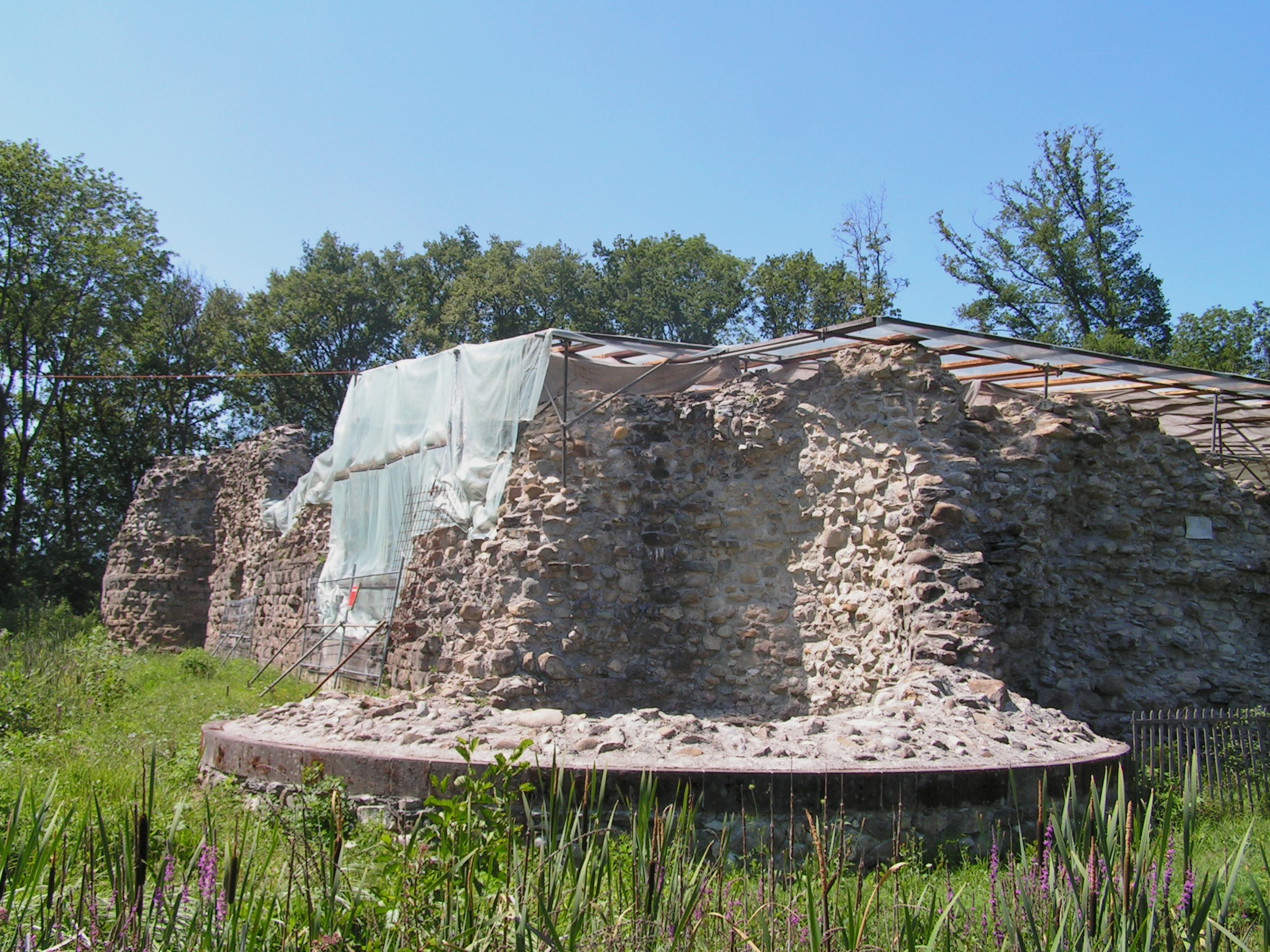 Ruines du Château de Rouelbeau